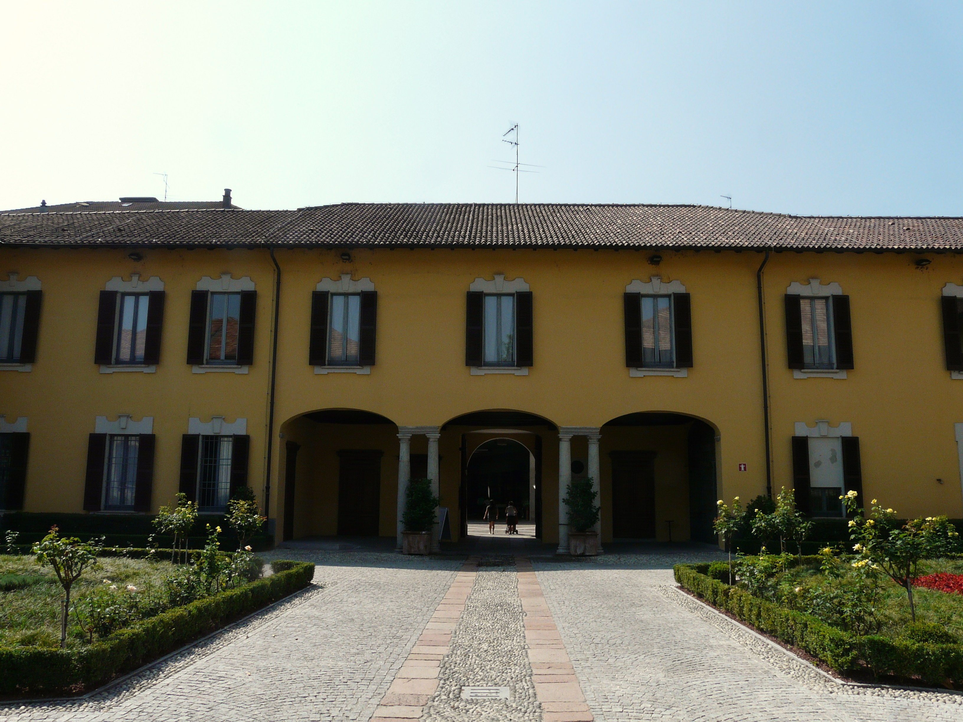 Palazzo municipale, Magenta, Lombardia, Italia